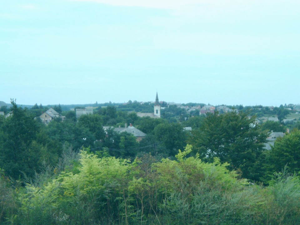 Tés, Hungary